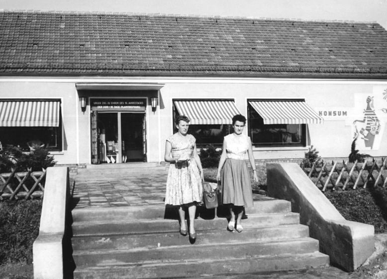 Blankenfelde, Blick auf den Konsum Zentralbild Martin 28.8.1959 Moderne Landverkaufsstelle des Konsum Am 10. Jahrestag der DDR besteht die Landverkaufsstelle in Blankenfelde bei Berlin ein Jahr. Die nach den modernsten Gesichtspunkten eingerichtete Verkaufsstelle ist auf Teilselbstbedienung eingerichtet. Der monatliche Umsatz stieg in dieser Zeit von 56.000, -- DM auf 80.000, -- DM. Für nicht vorhandene Waren wurde ein Bestellsystem eingeführt. Die Kunden werden vom Verkaufsstellenleiter und fünf Verkaufskräften bedient. UBz: Die Straßenansicht der modernen Landverkaufsstelle.